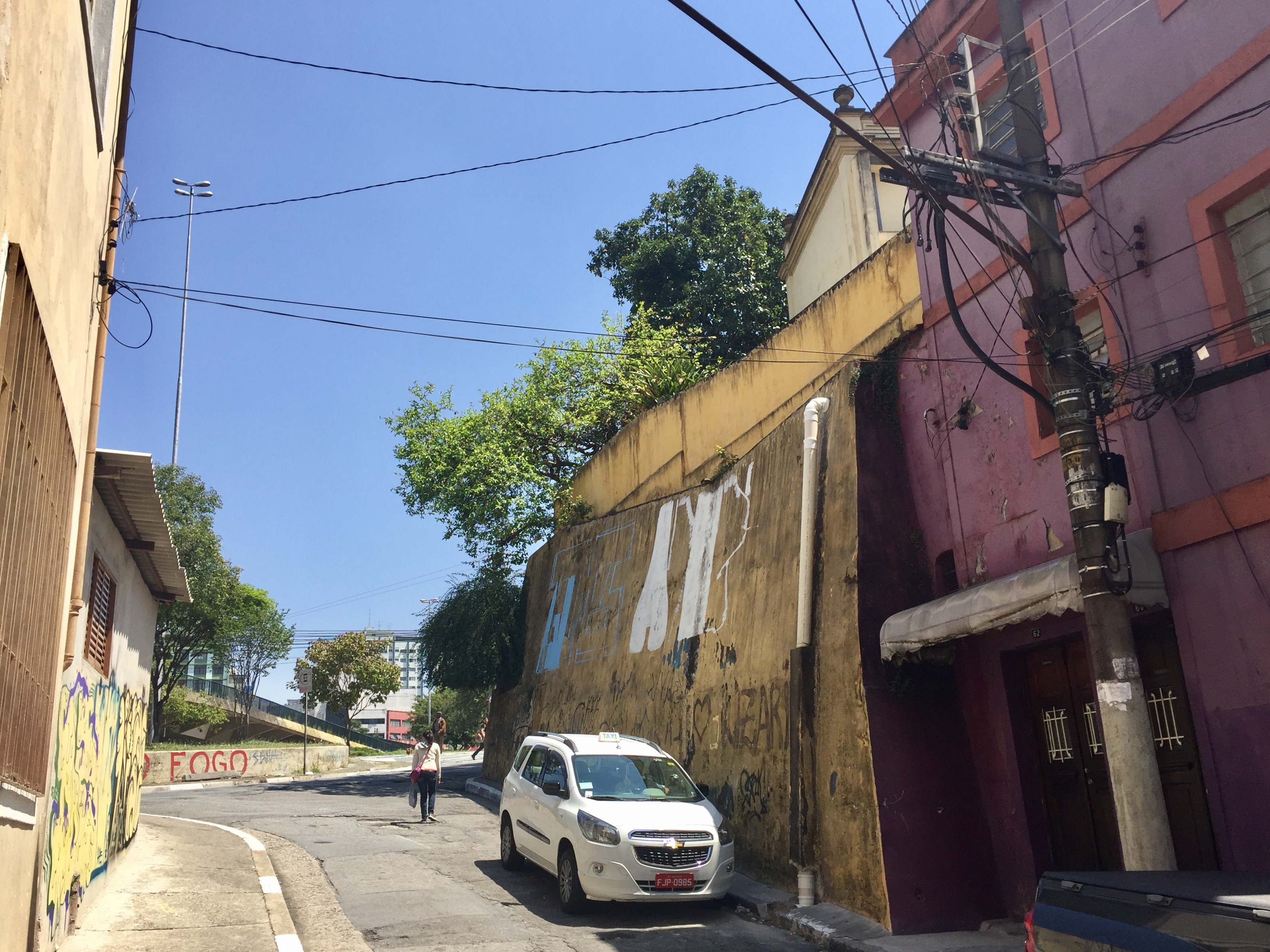 Muro sul da Casa de Dona Yayá, visto da rua Jardim Heloísa, em São Paulo (SP), Brasil